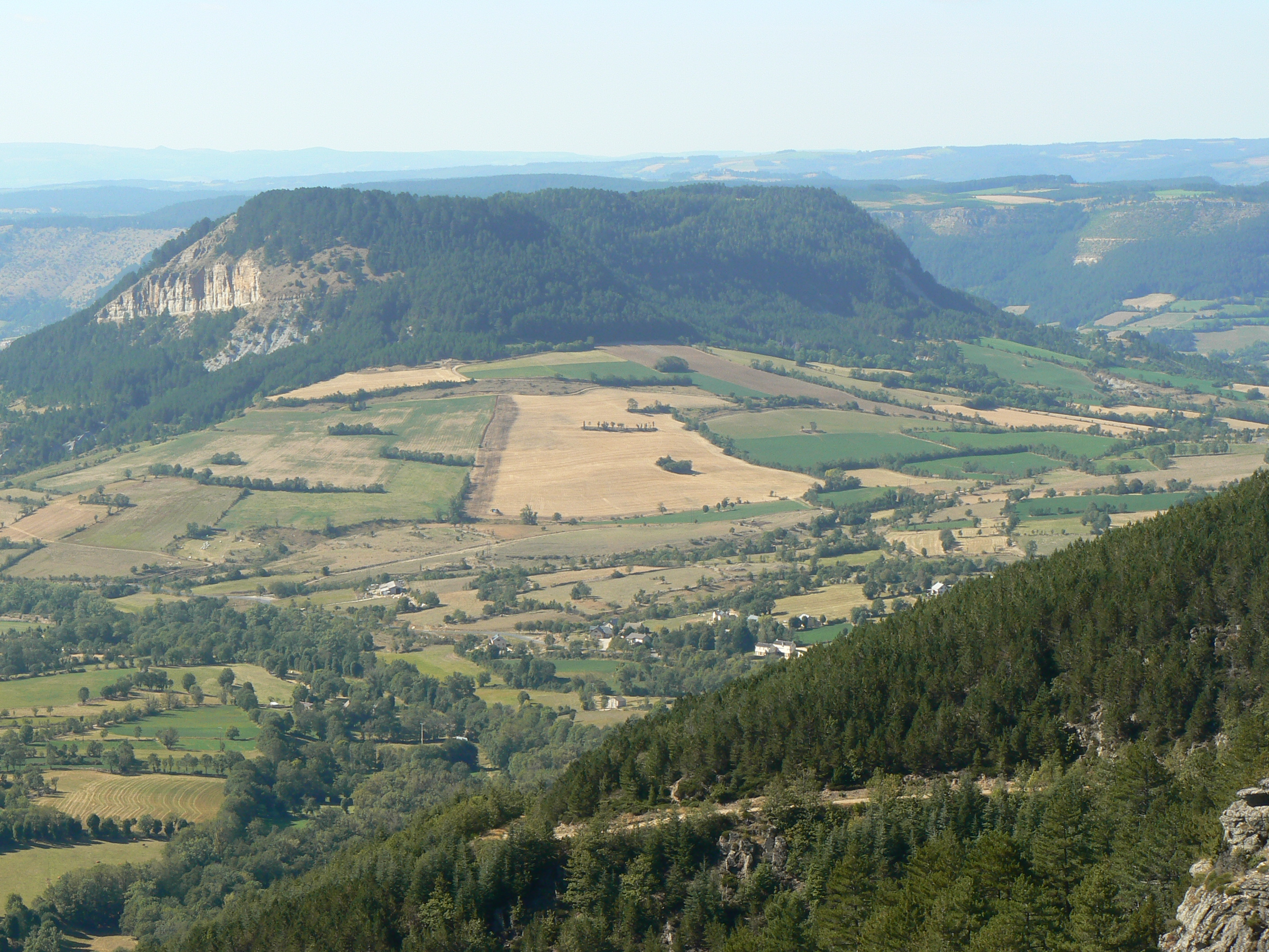 Le truc de Balduc vu depuis le causse de Mende (mont Mimat) en Lozère (France)